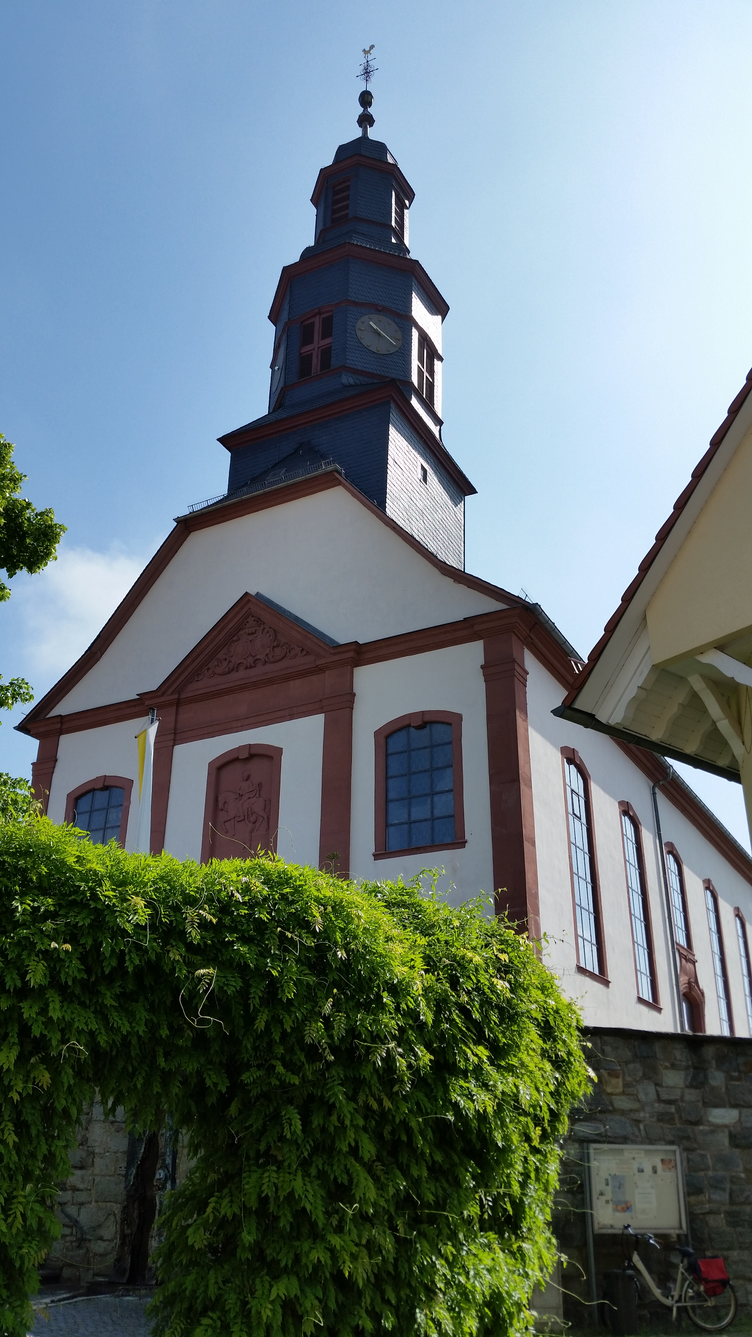 1765 in Ober-Erlebnbach gebaute katholische Kirche.